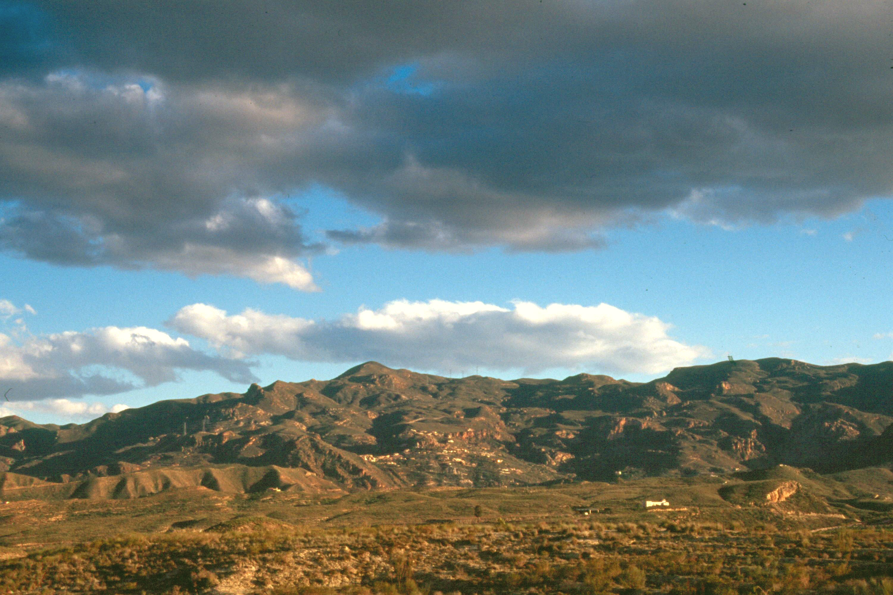 Sierra Cabrera desde el norte, Almería, España.